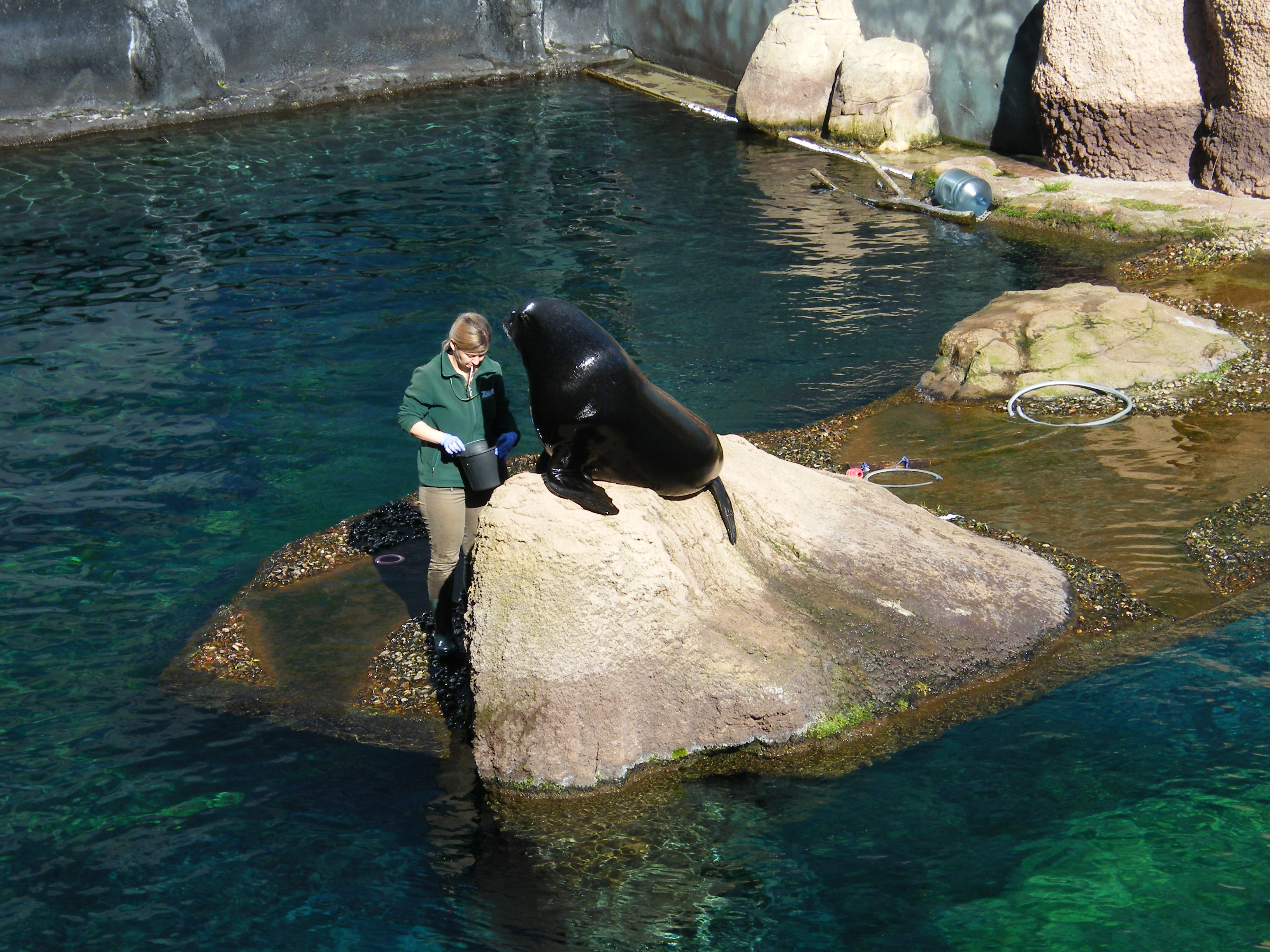 Lachtan jihoafrický v ZOO Wroclaw